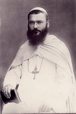 Mgr Augustin Hacquard des Pères blancs (1860-1901) missionnaire au Soudan français et explorateur.